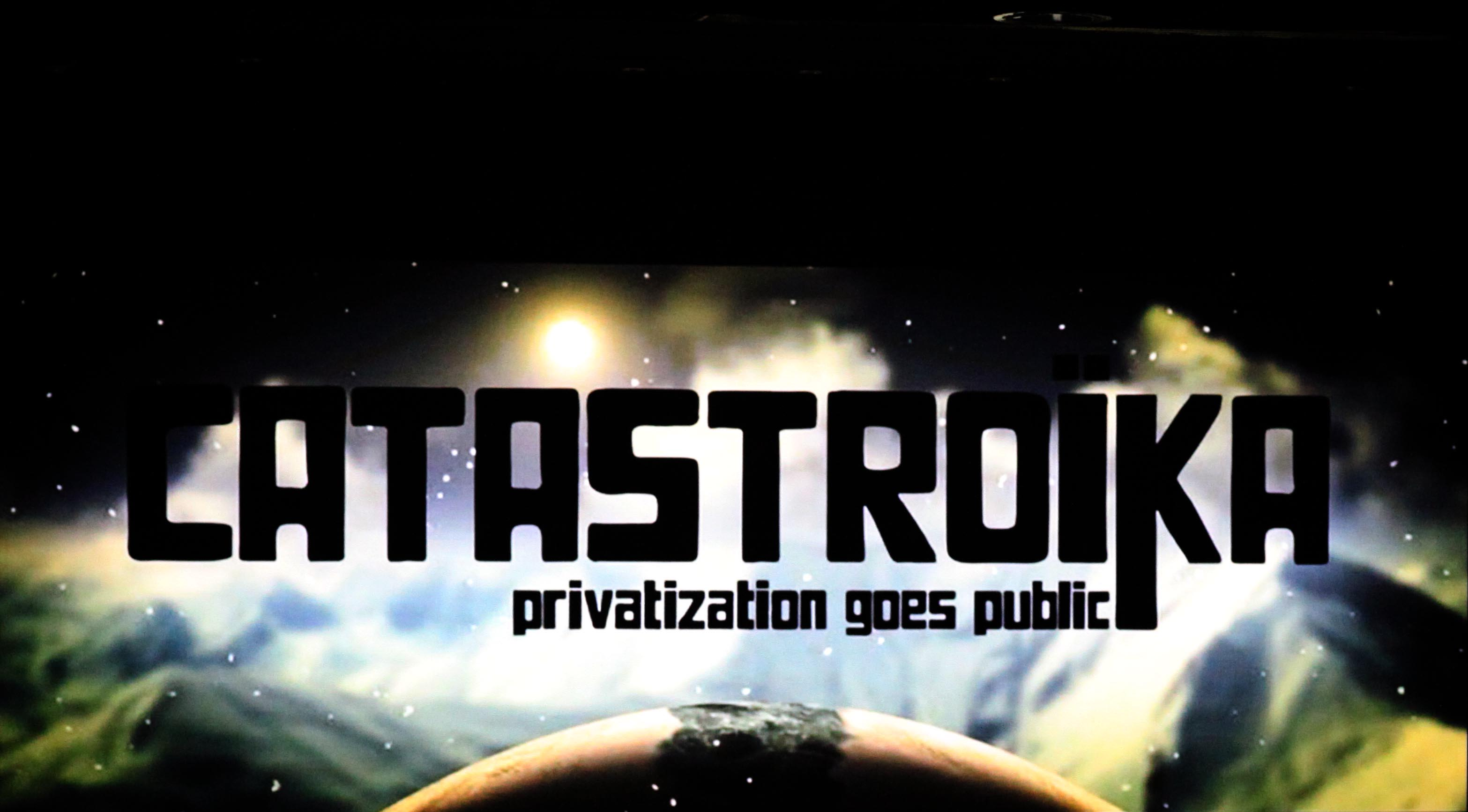 Quito (Ecuador), 16 de mayo del 2012.- Presentación del Documental CATASTROIKA y Presentación de la Revista Debates y Combates. Foto: Xavier Granja Cedeño/Ministerio de Relaciones Exteriores, Comercio e Integración.